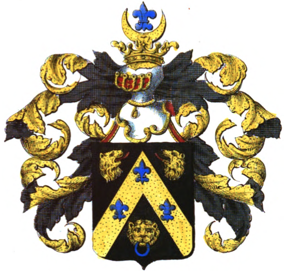 Armoiries de la famille della Faille de Leverghem